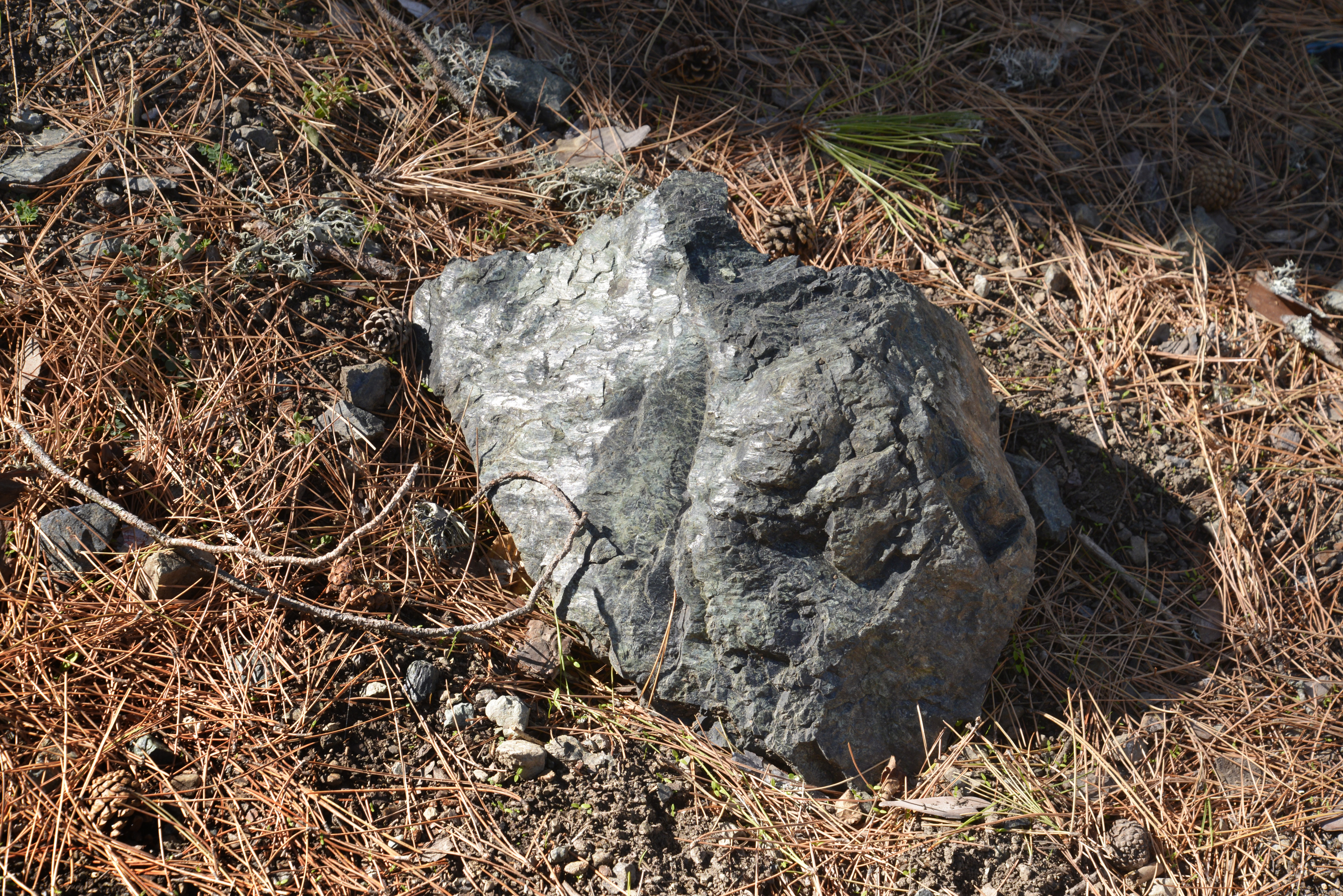 Rospigliani, Rospa (Haute-Corse) - Specimen de pietra verde, calcschiste « schiste lustré », dans la forêt de Padule.